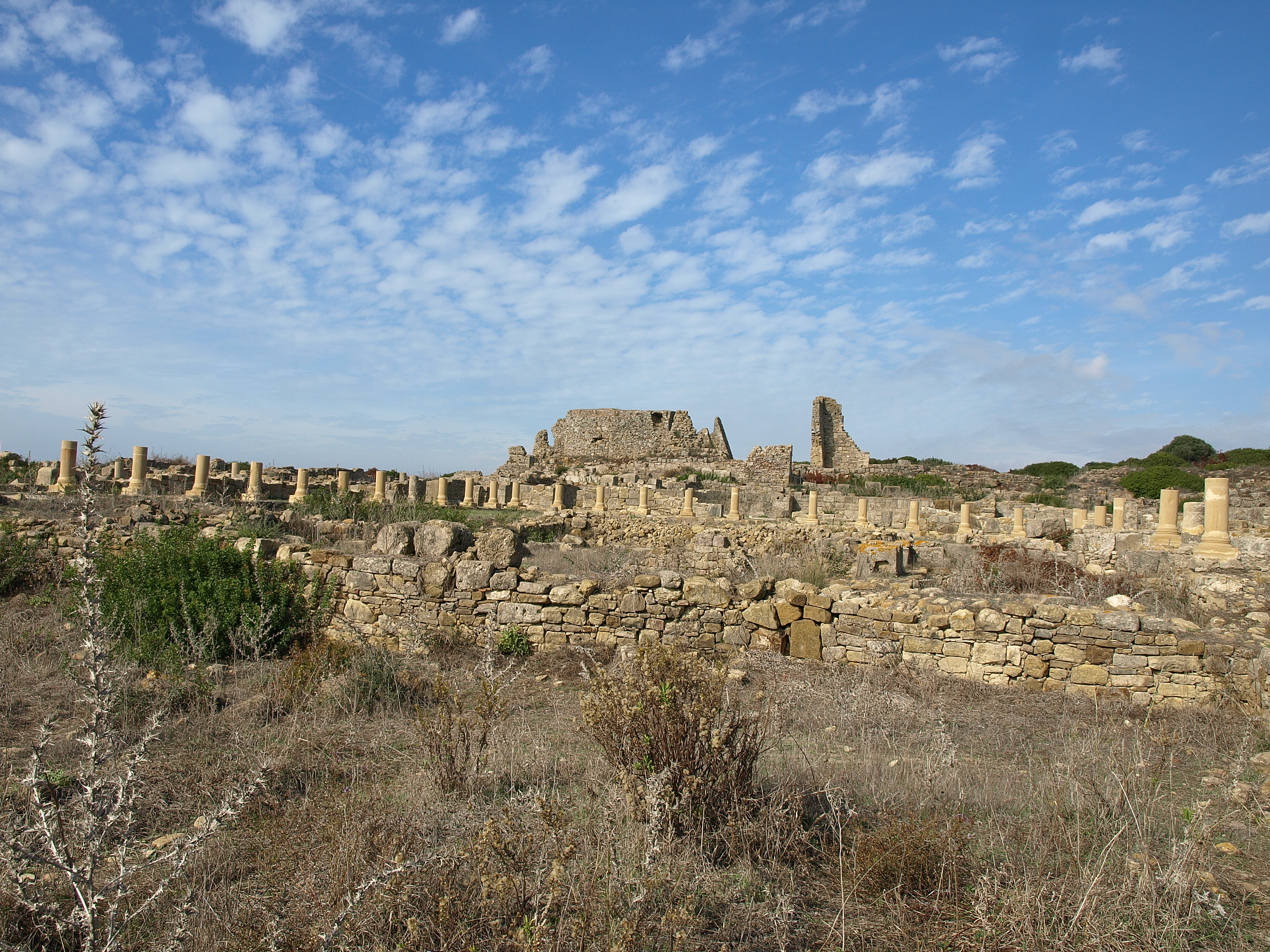 New Pillars which should show the area of a large building (temple?)